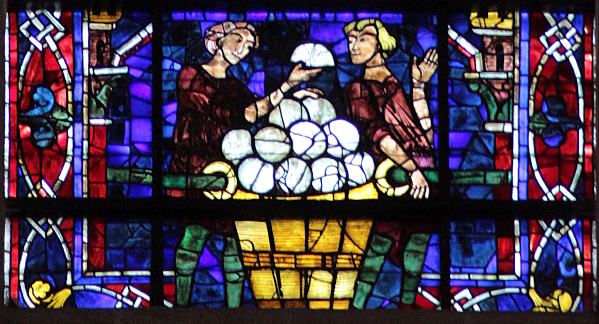 Donnateurs : les boulangers